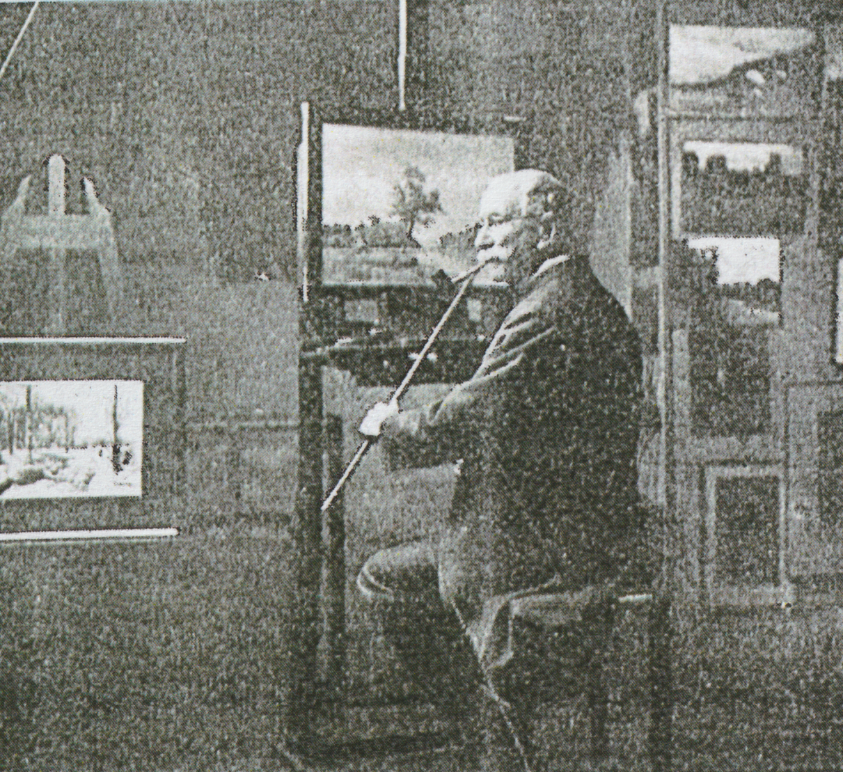 Léon Simon (peintre) - Portrait photographique dans son atelier à Metz.